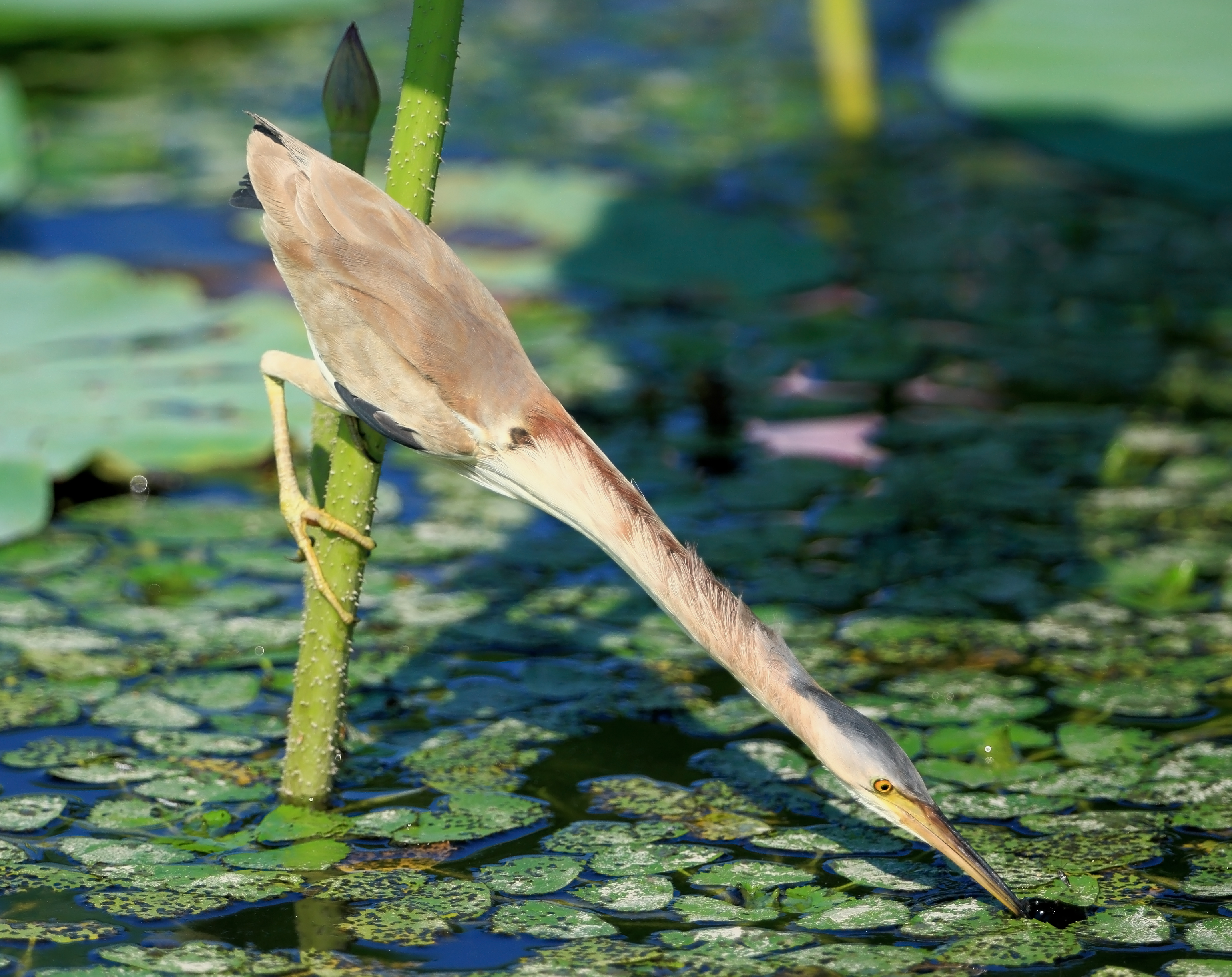 新潟県阿賀野市 瓢湖で撮影されたヨシゴイ。 水中の魚を補食するために頸部を伸ばしている。